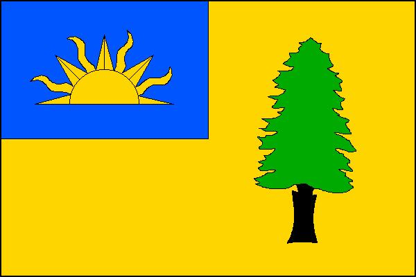 Vlajka obce Písečná (okres Frýdek-Místek)